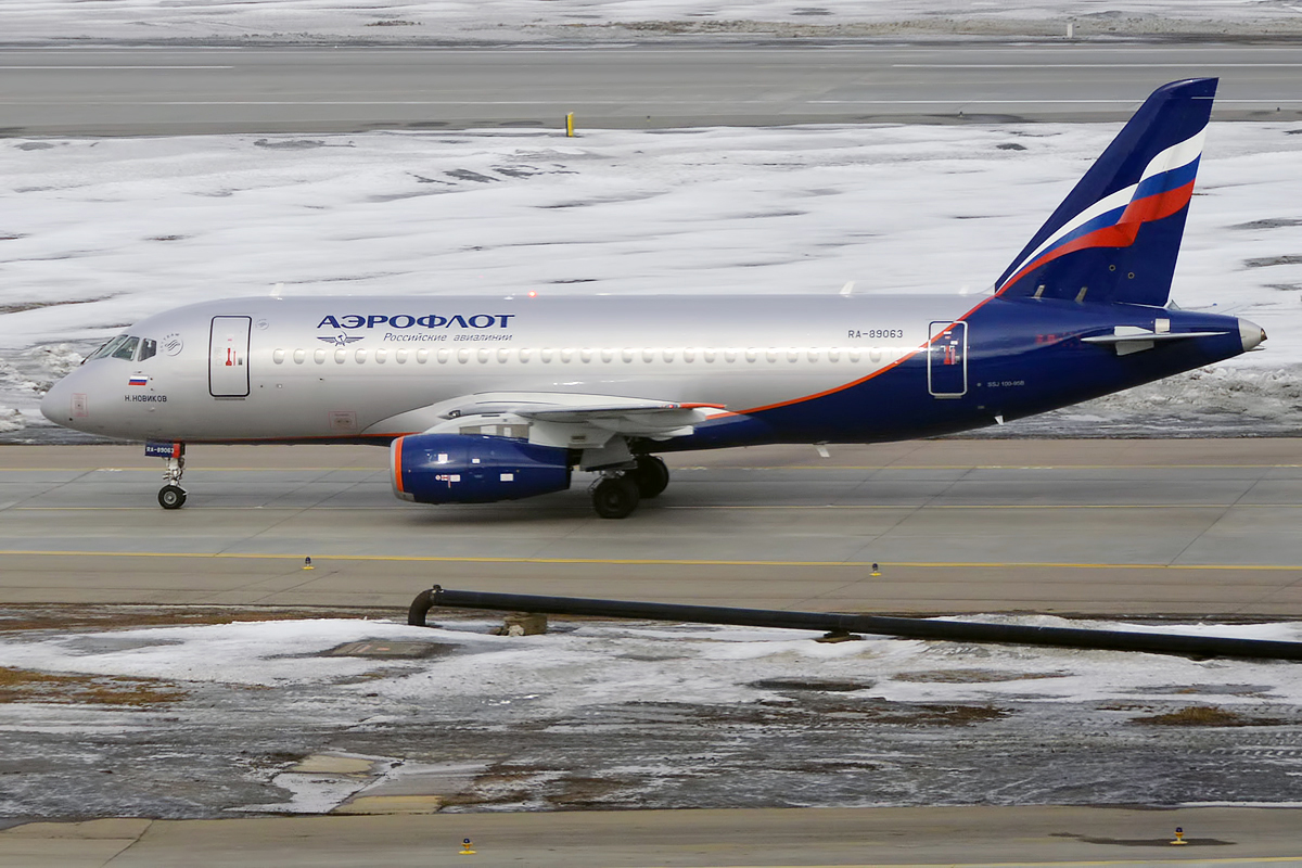 Aeroflot, RA-89063, Sukhoi Superjet 100-95B